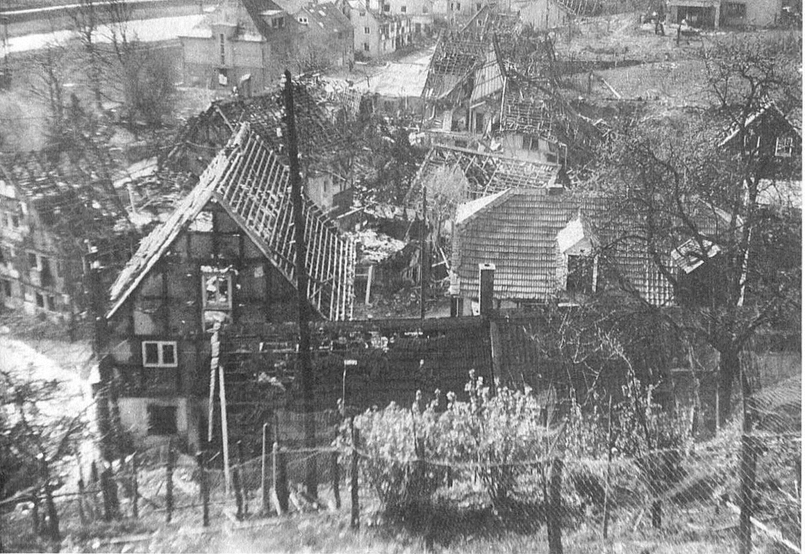 Die ältesten Fachwerkhäuser im Unterdorf wurden zerstört oder beschädigt bei der Bombardierung 1945. Das Haus Brunsbach (links) konnte wiederhergestellt werden, heute Café Zinnober